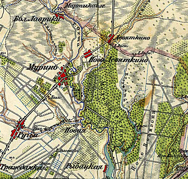 Фрагмент карты окрестностей Петрограда 1914-17 г., включающий северо-восточные пригороды - Мурино, Девяткино, Медвежий стан, Ручьи и Гражданку.